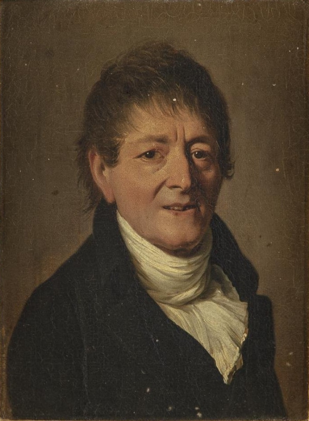 Monsieur Louis-Léon Homberg, né en 1736, mort en 1809